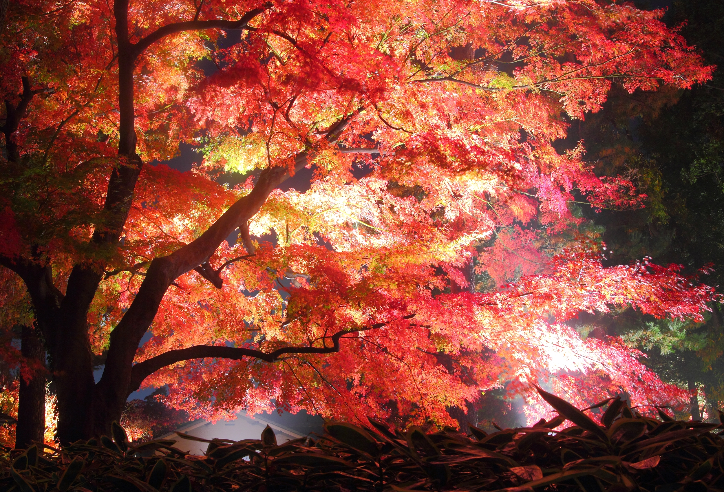 大田黒公園（東京都杉並区）